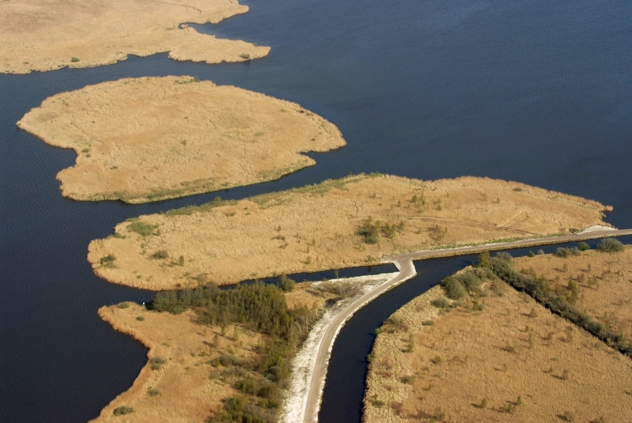 Schilfzonen am und im Großen Meer in der Gemeinde Südbrookmerland; der abgebildete Bereich liegt im Naturschutzgebiet „Südteil Großes Meer“; Blick von West nach Ost den See